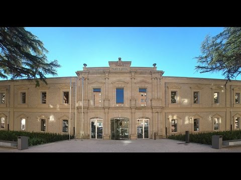 Palacio de Justicia de La Rioja